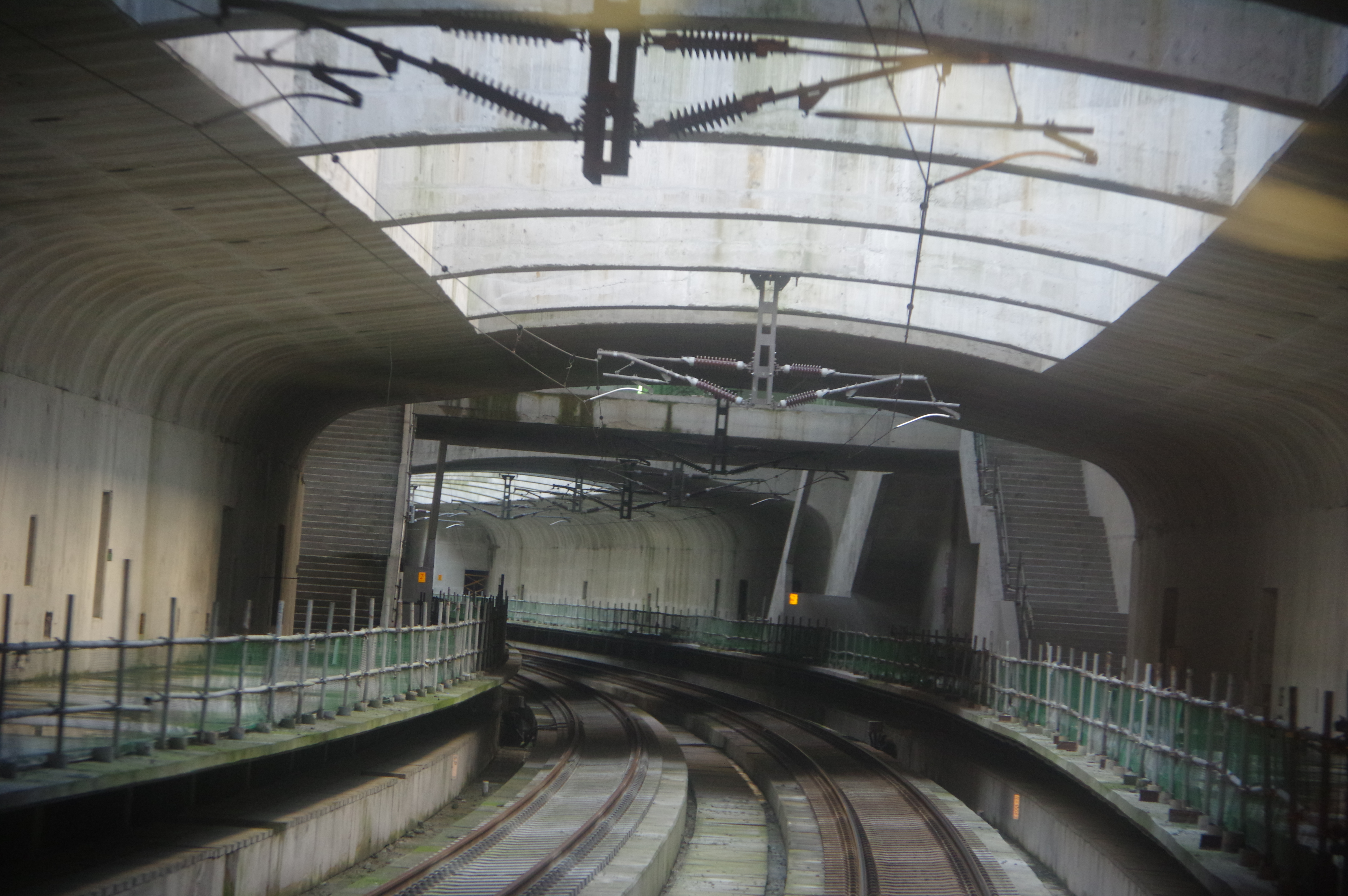 位於臺灣鐵路管理局溪口隧道內的林榮車站月台